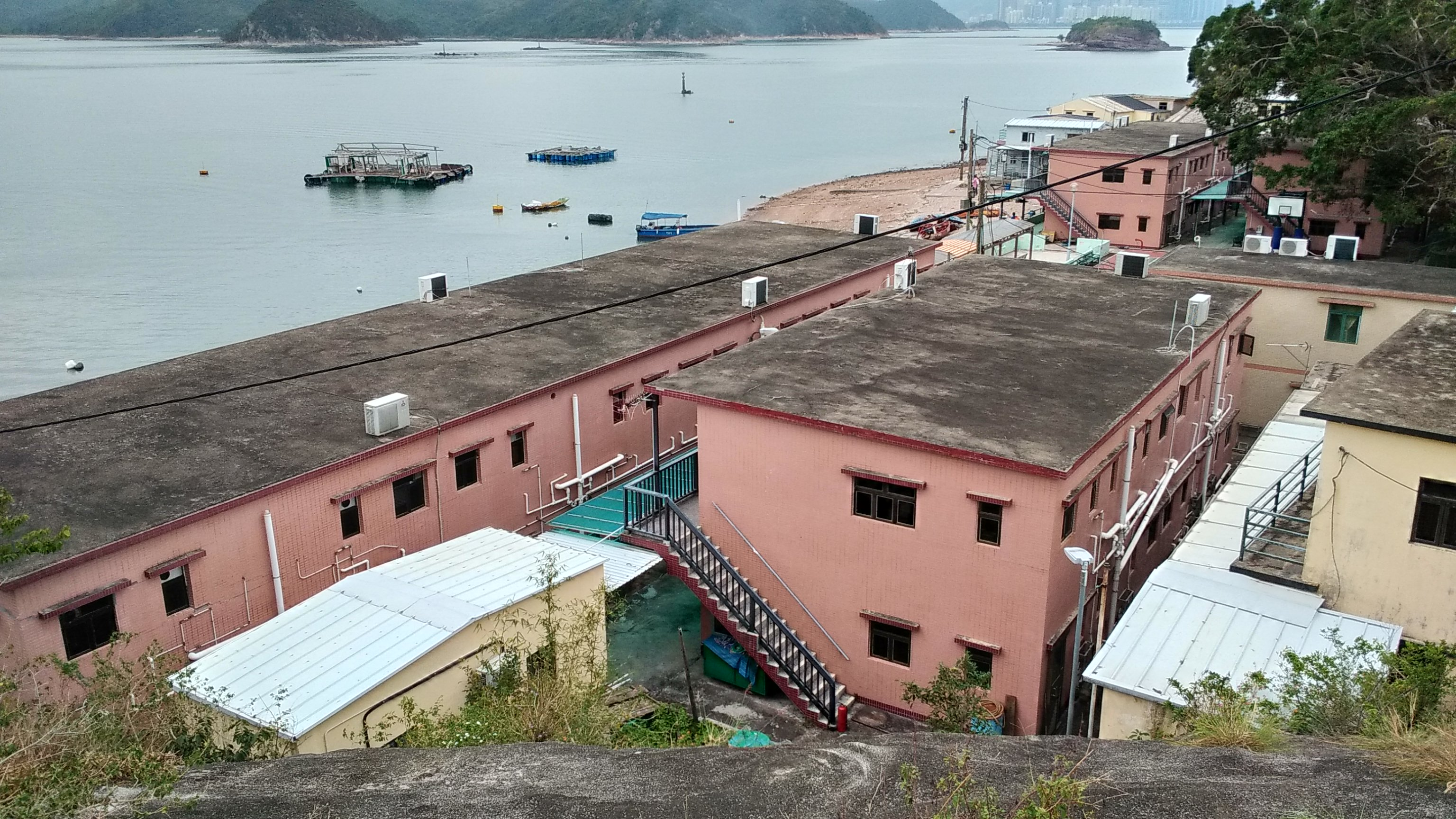 中文（香港）: 鴨洲漁民村_2018